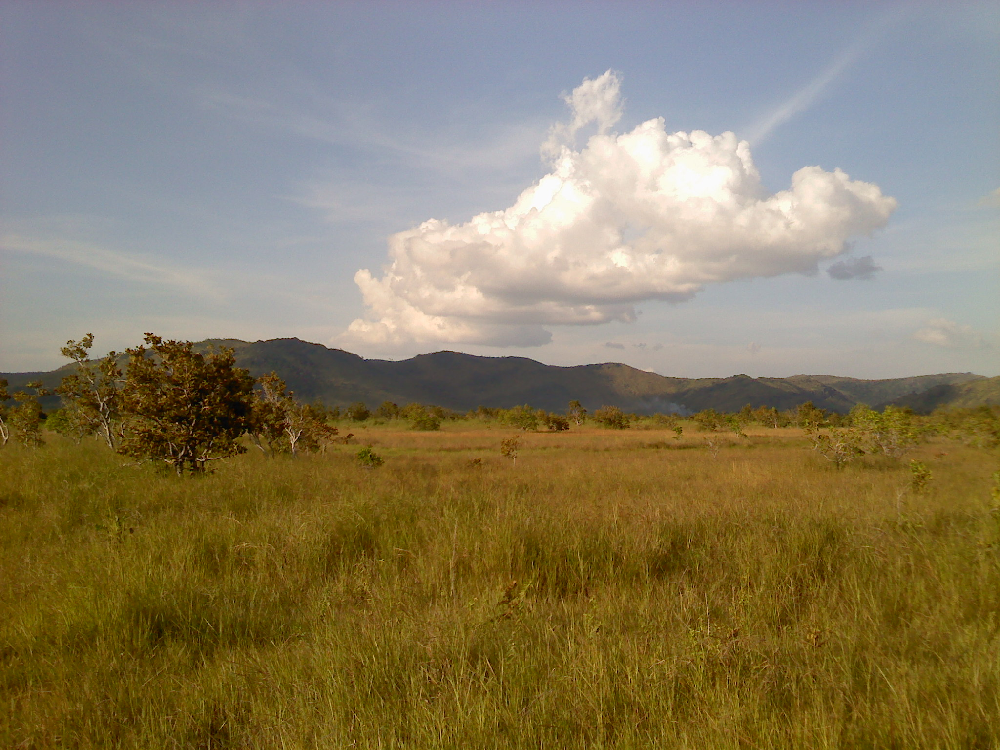 CADENA MONTAÑOSA IMATACA, ESTA BOLIVAR